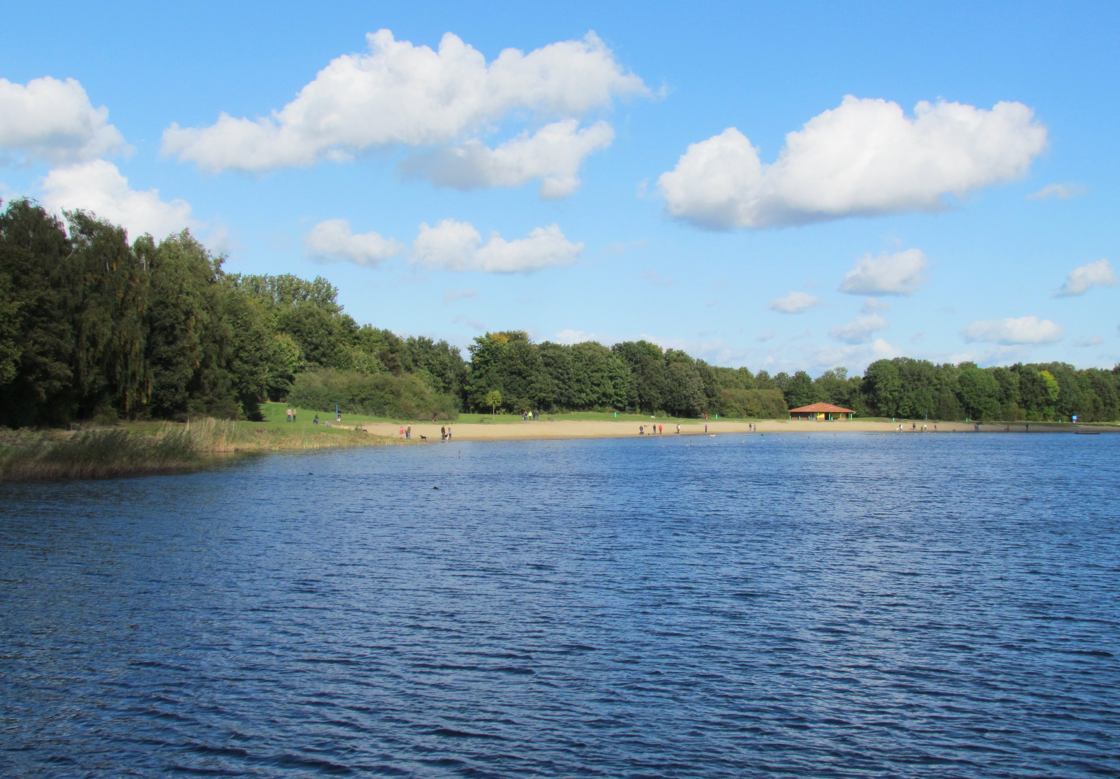 Recreatieplas Bussloo, Gelderland (NL) in het najaar